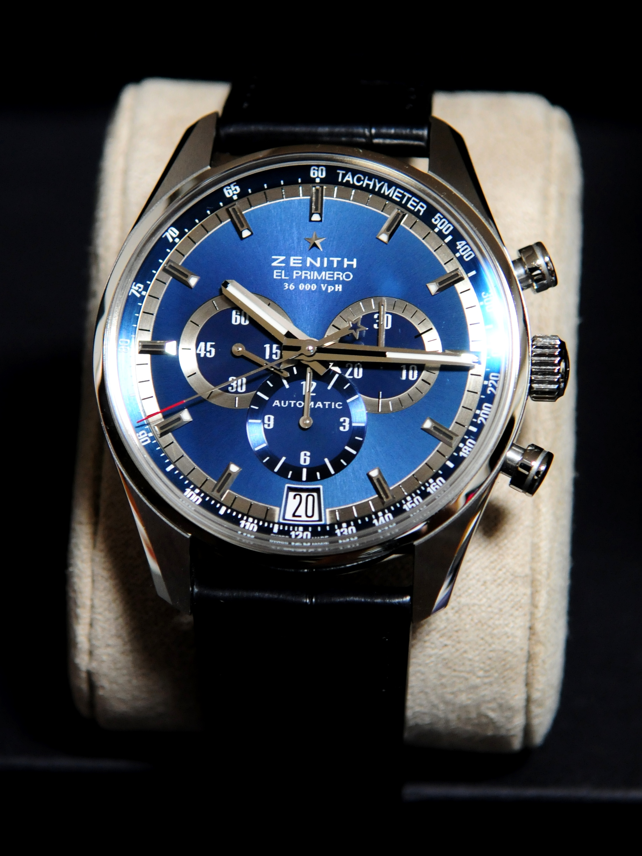 エル・プリメロ36000VpH・シャルル・ベルモ・トリビュート